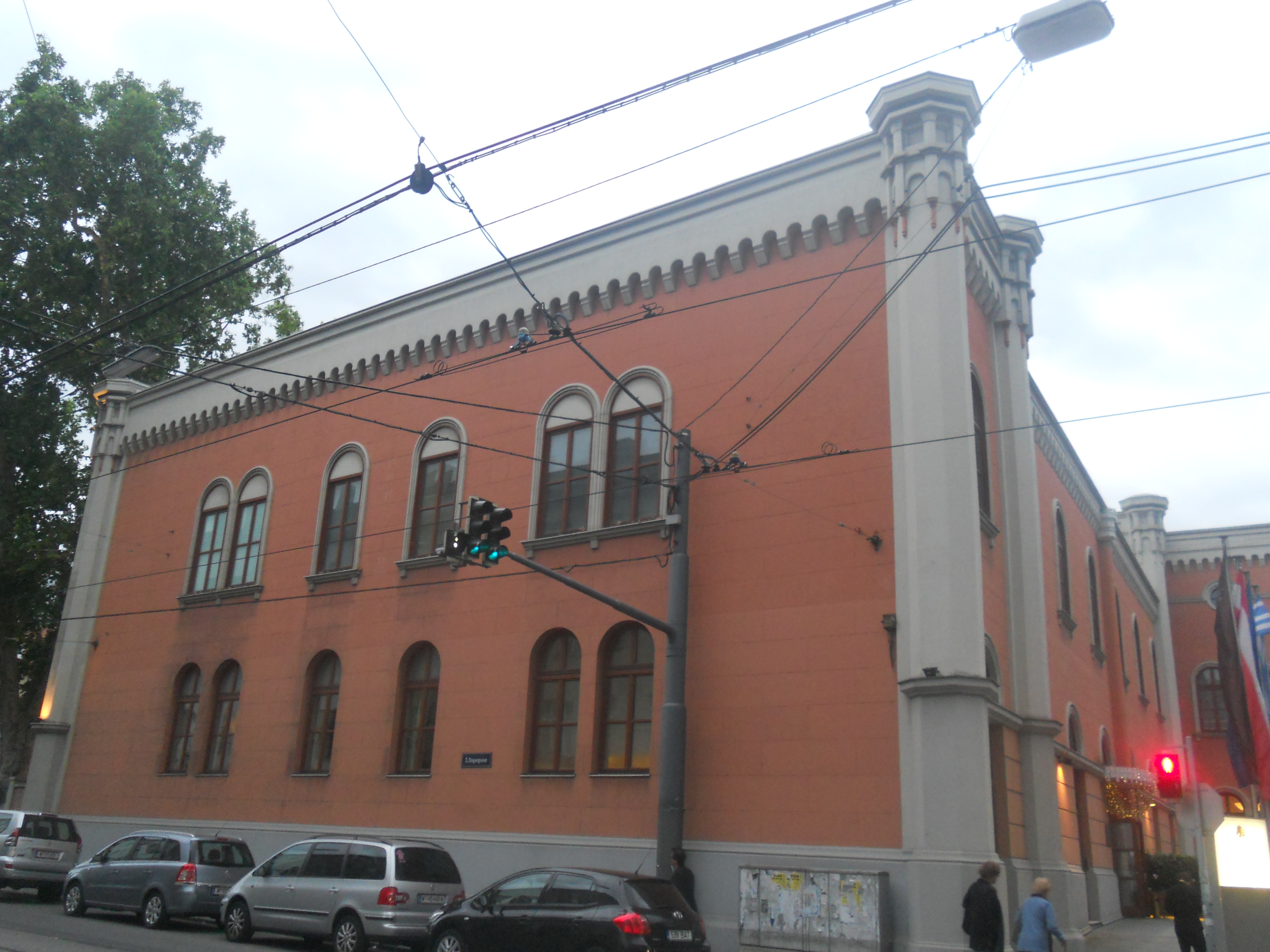 Das ehemalige k. u. k. Equitationsinstitut in Wien, jetziges Hotel Penta Renaissance